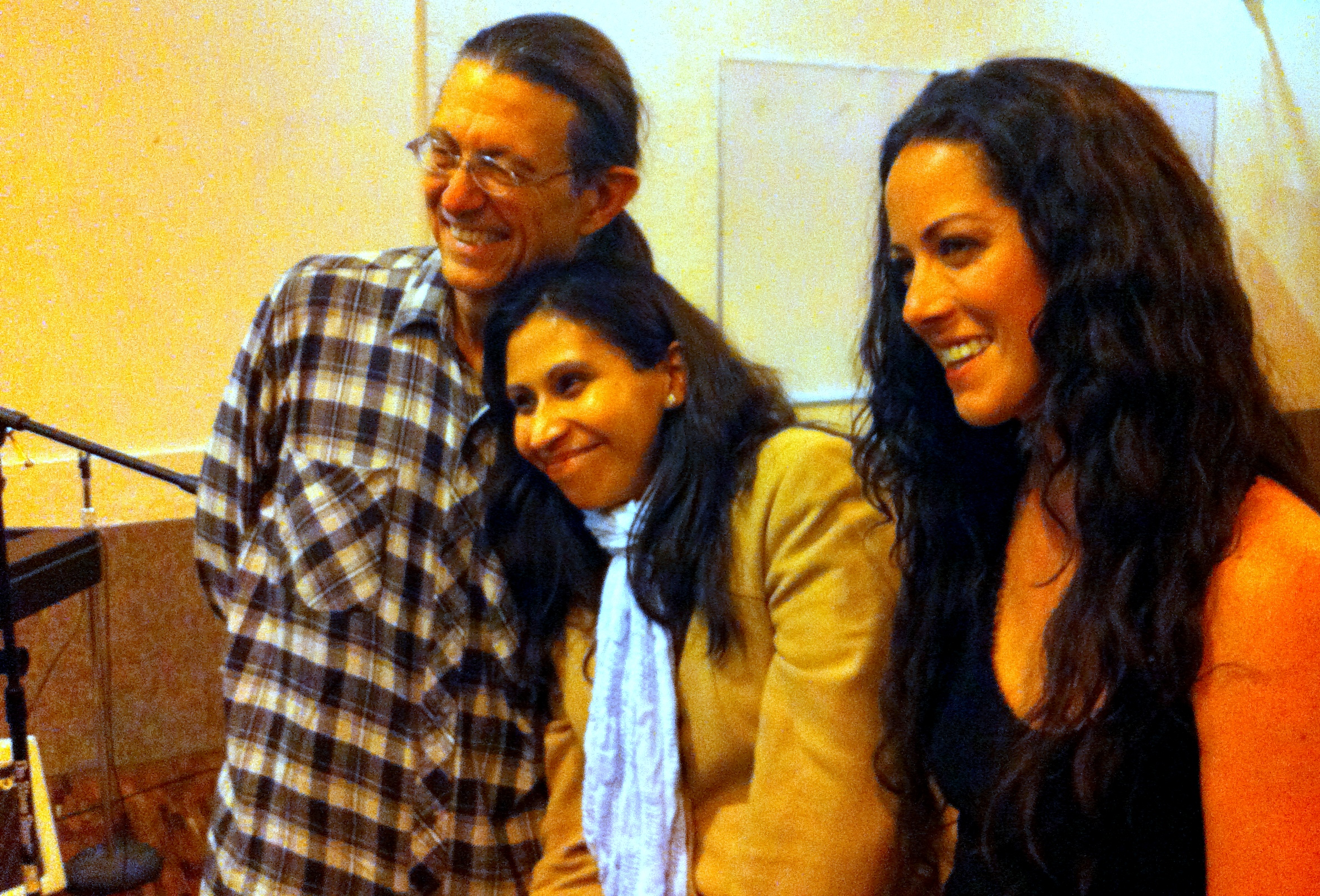 MEMO MÉNDEZ GUIÚ